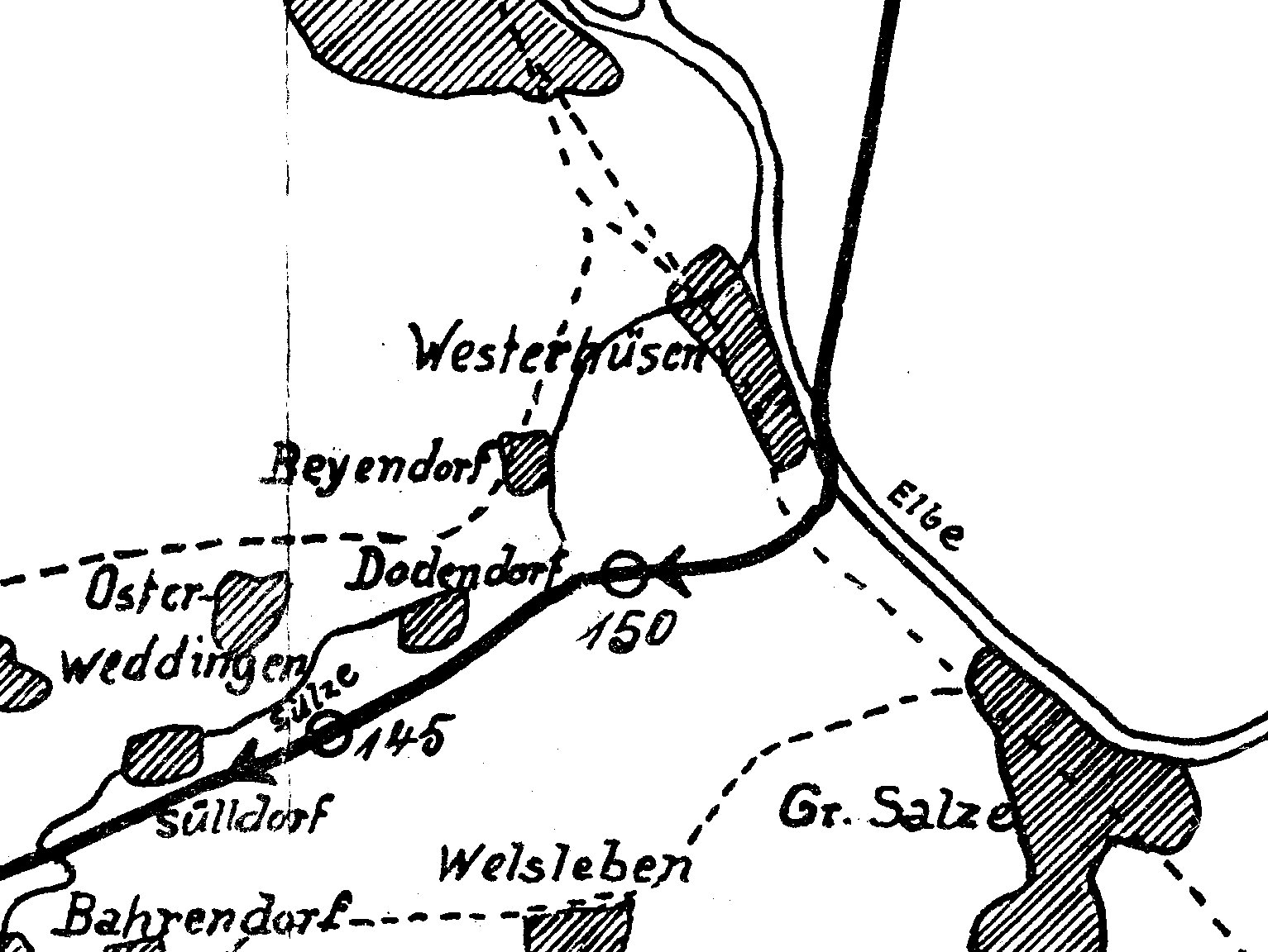 Lageplan der Linie des östlichen Abschnitts der (nicht verwirklichten) Südvariante des Mittellandkanals, Teilstück Sülldorf-Westerhüsen